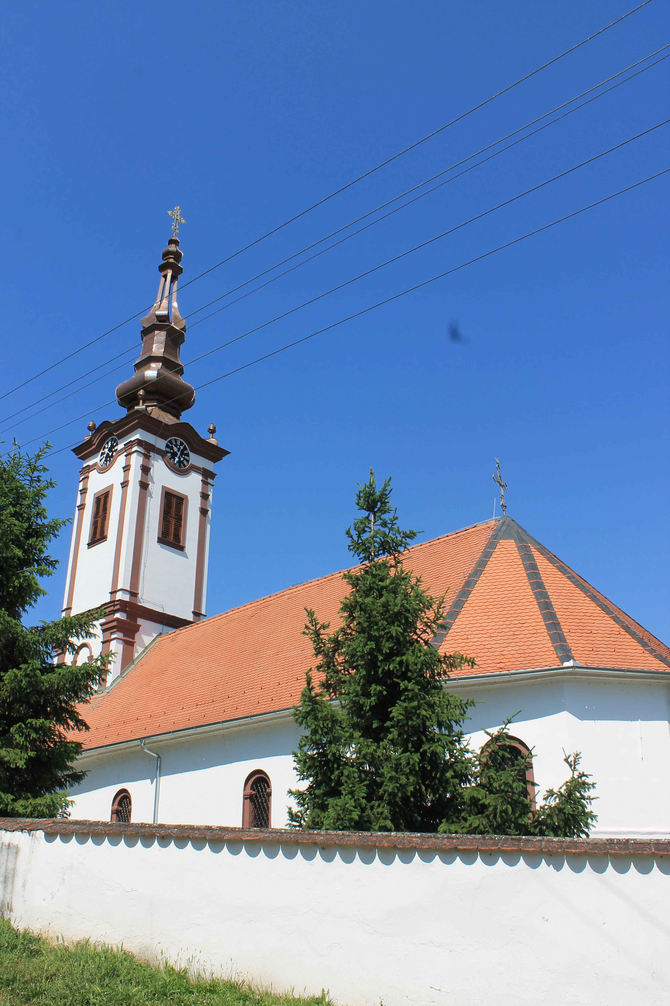 Crkva Sv. Save (Čerević)